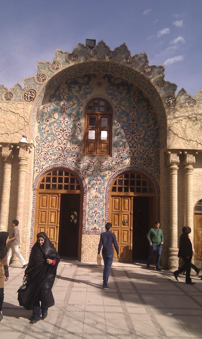 درس باستان شناسی